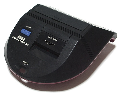 メガアダプタ(HAA-2600)。投稿者撮影。 メガドライブ本体でセガ・マークIII/マスターシステム用ソフトを使用するための周辺機器。 左の青ボタンはポーズボタン、手前の▽印下がマイカード用スロット。カートリッジは上部の蓋を開けて差し込む。